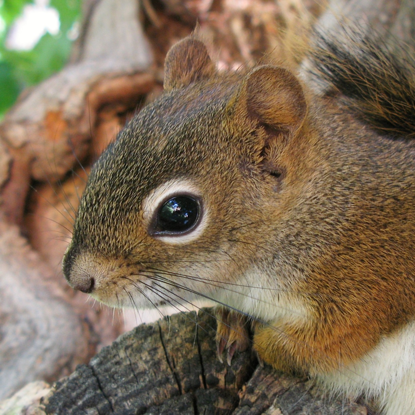 Tamiasciurus hudsonicus (Écureuil roux nord-américain / North American red squirrel) in Bas-Saint-Laurent, Province de Québec, Canada